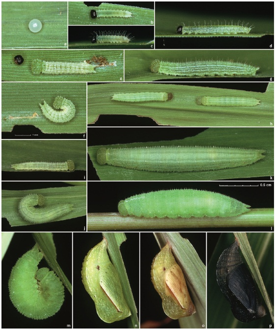 Hermeuptychia sosybius